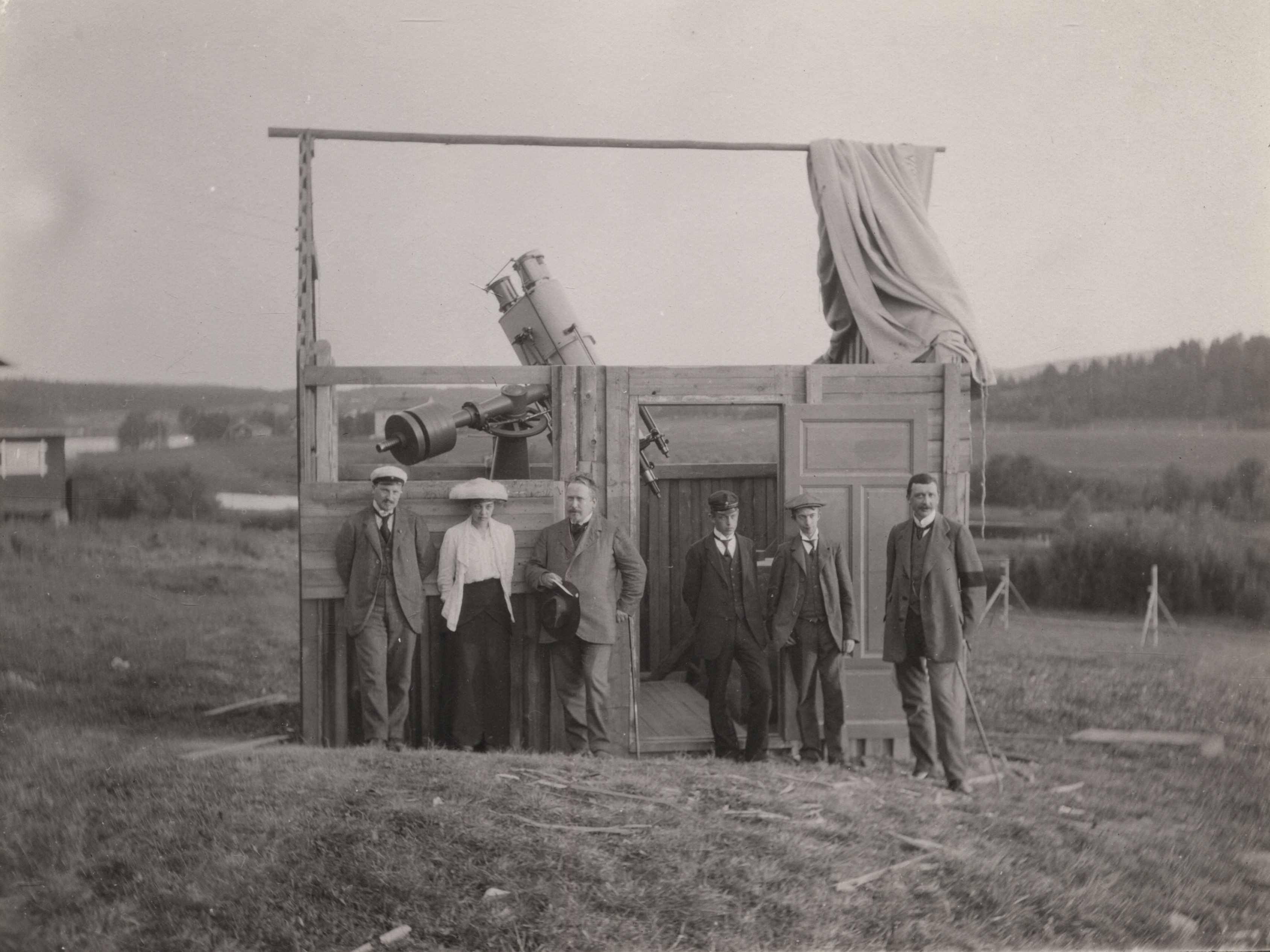 Medlemmar i Vetenskapsakademiens solförmörkelseexpedition till Forse (nuvarande Sollefteå kommun) i Ångermland 1914 stående framför den tillfälliga byggnaden för observationsinstrumentet. Från vänster: Knut Lundmark, Andrea Lindstedt, Östen Bergstrand, två okända män och Nils Tamm.